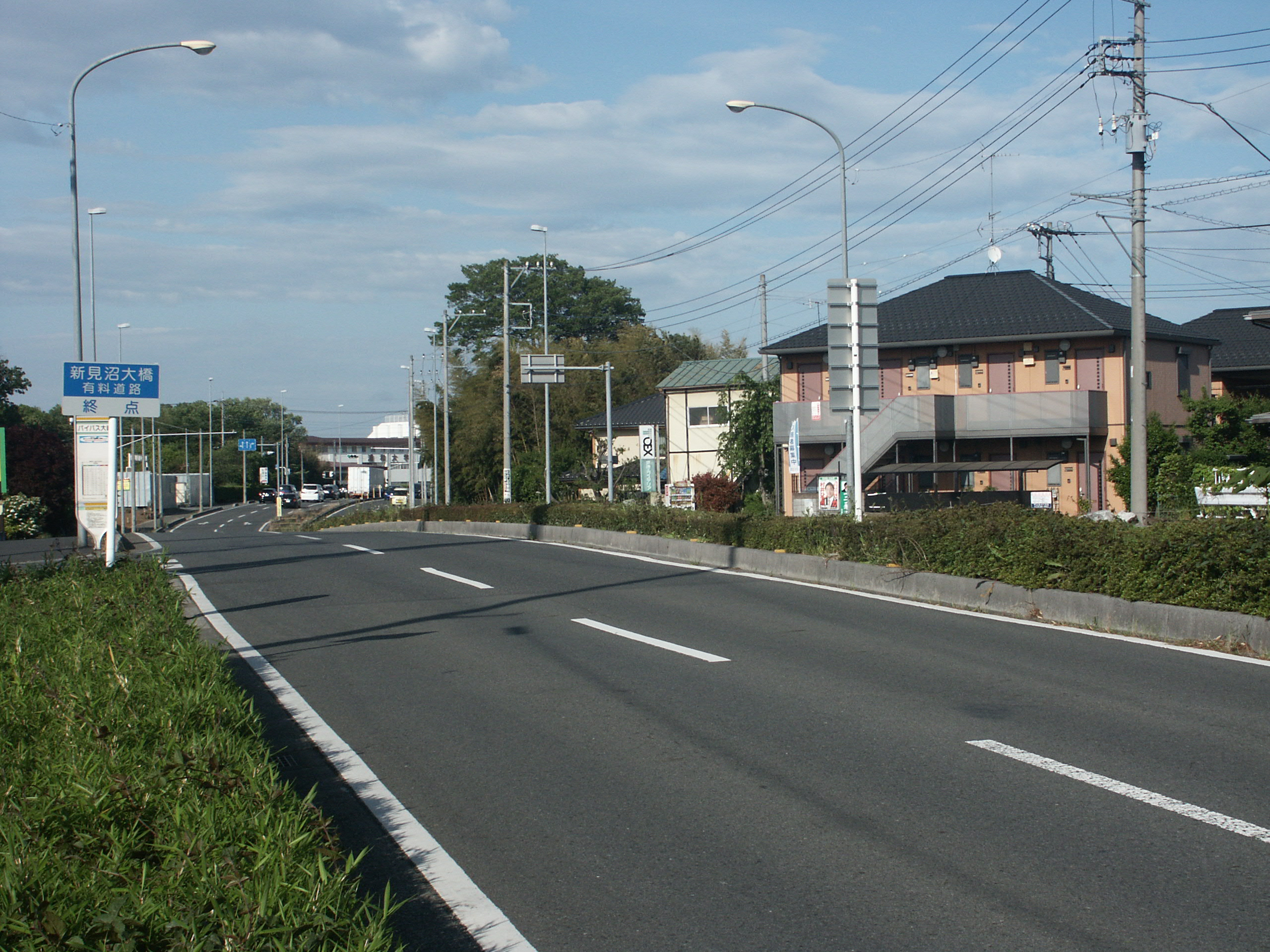 国道463号線新見沼大橋有料道路（さいたま市緑区大崎付近）